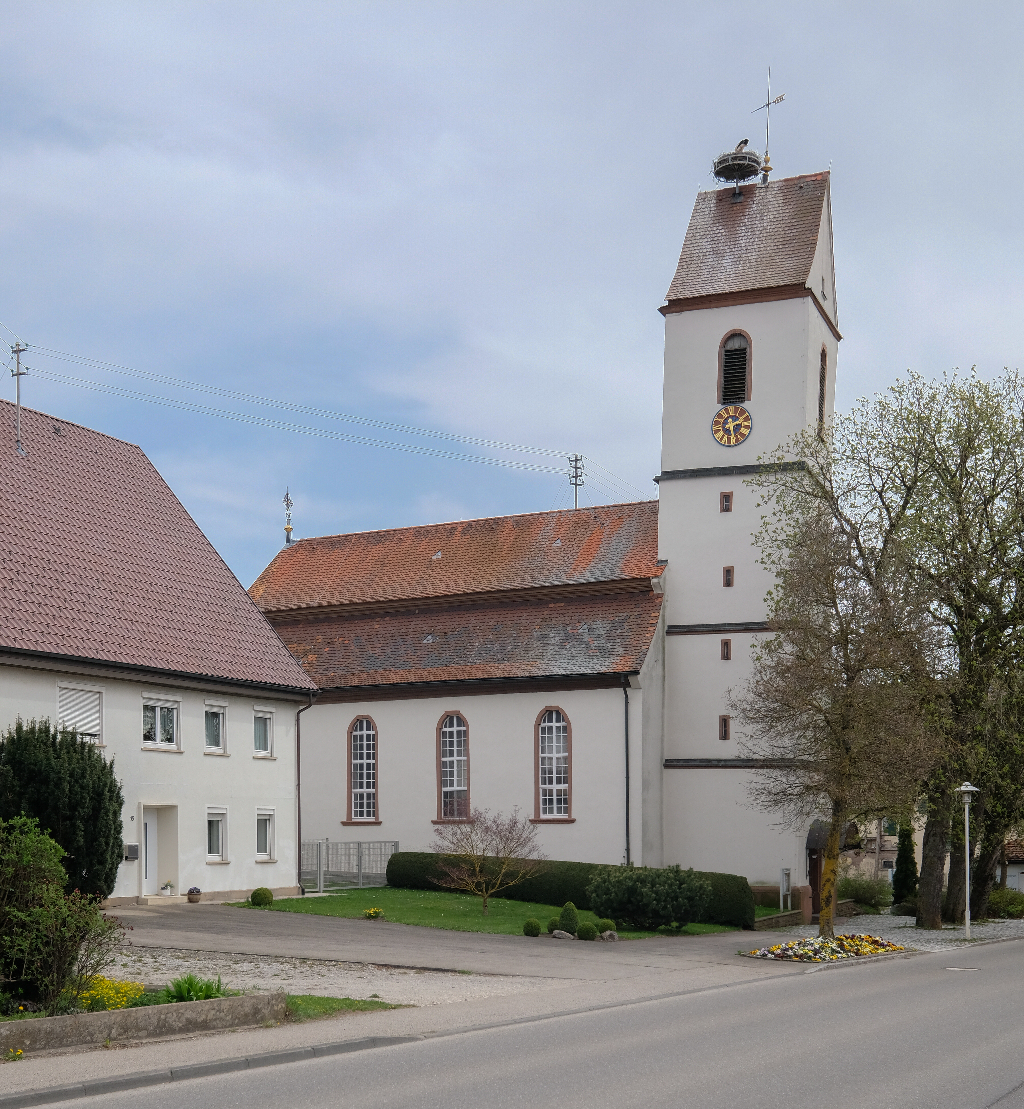 Evangelische Kirche, Trossingen-Schura, Landkreis Tuttlingen, Baden-Württemberg, Deutschland